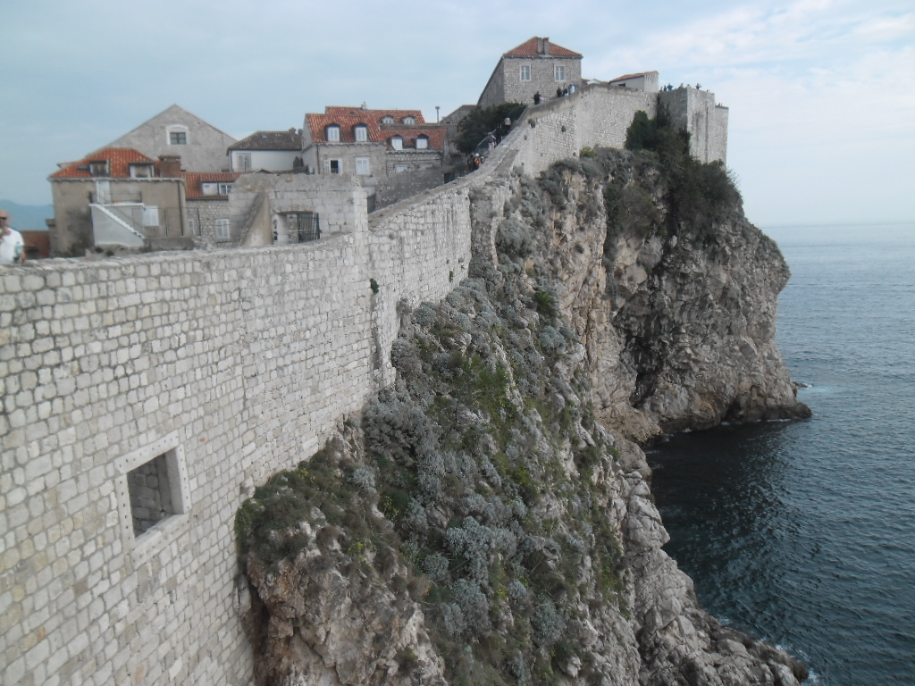 Dubrovnik